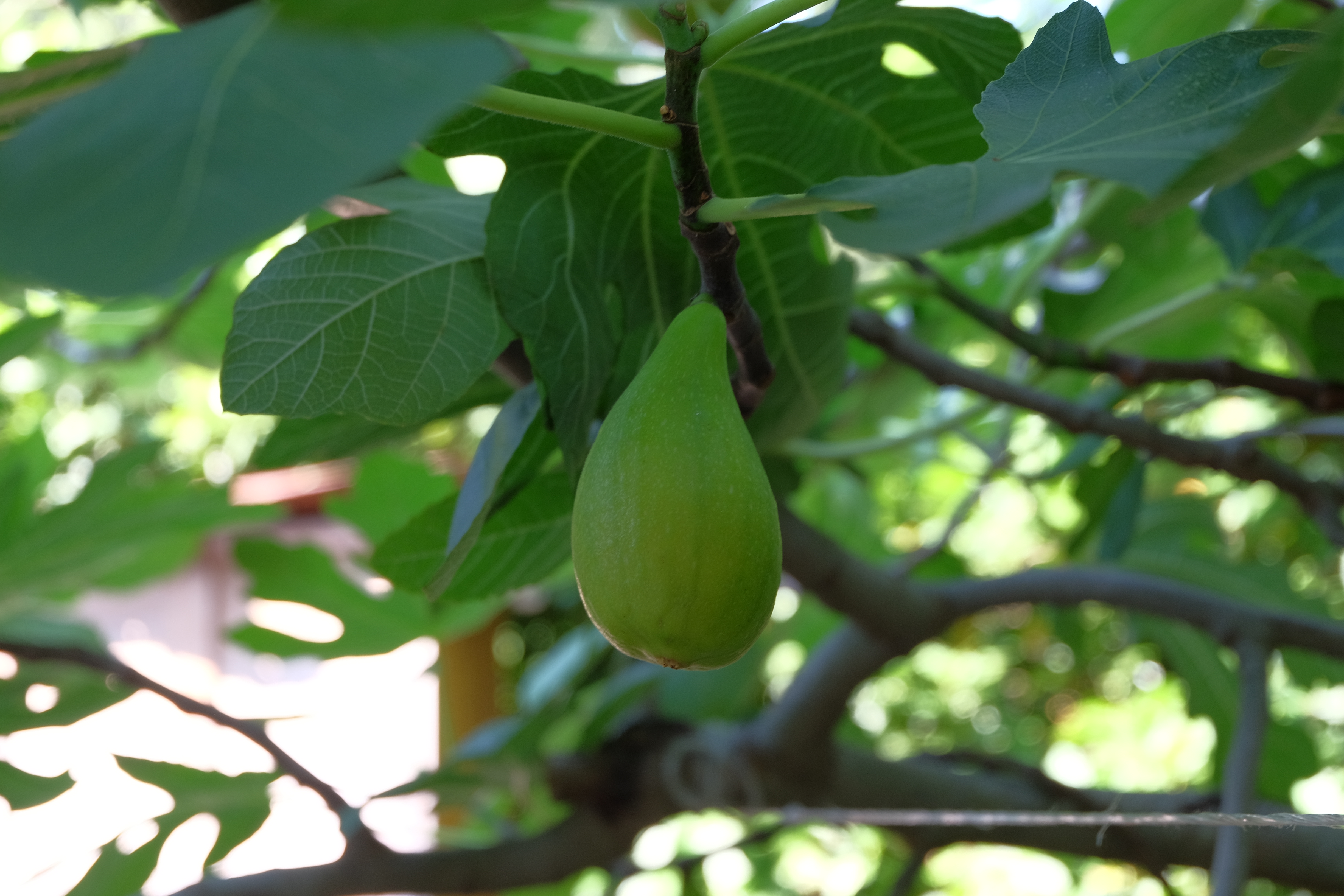 Плод инжира Ficus carica. Алупка, Крым